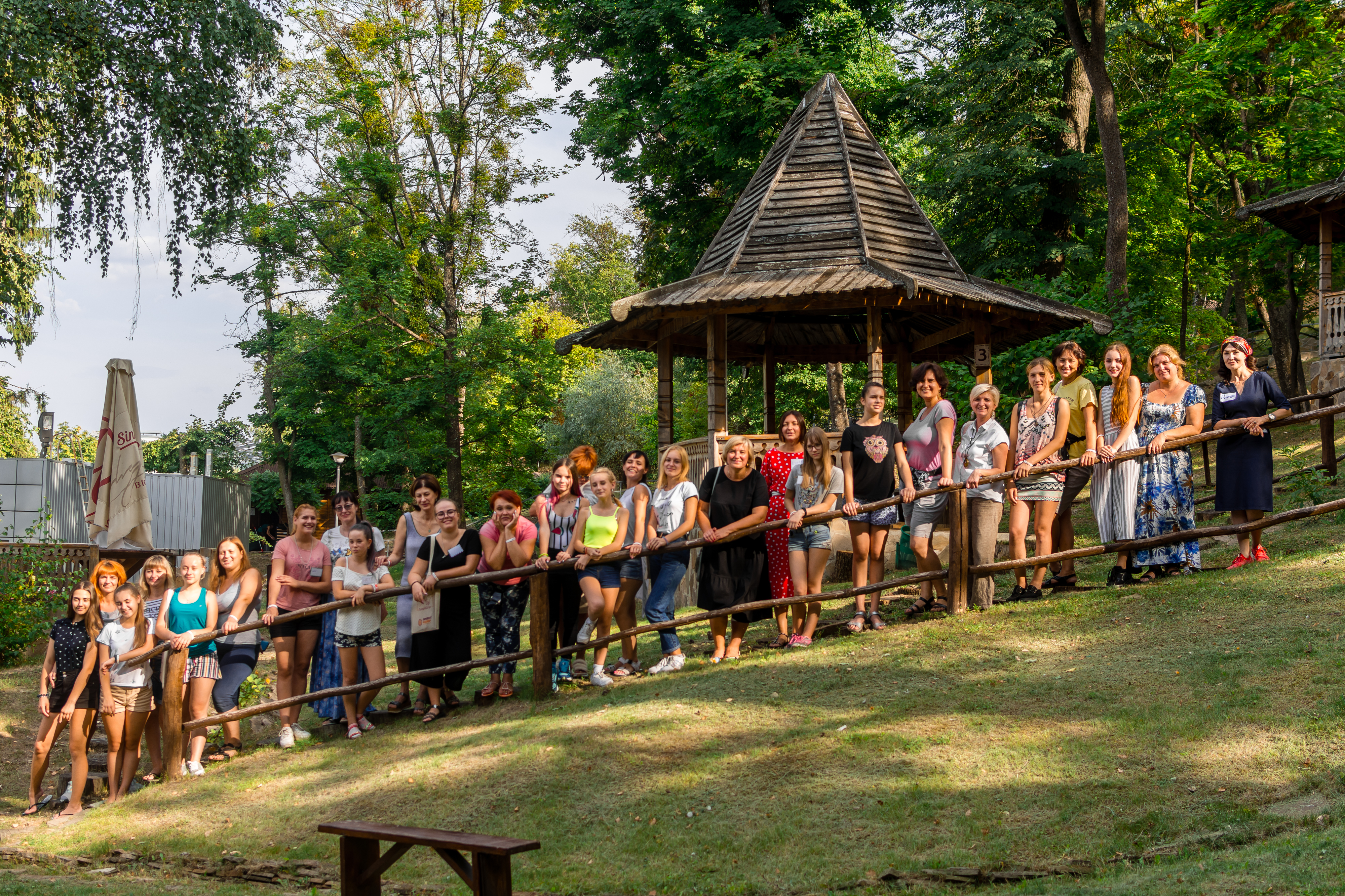 Учасниці шаббатону "Мами-доньки" (Харків, 2019 р.)